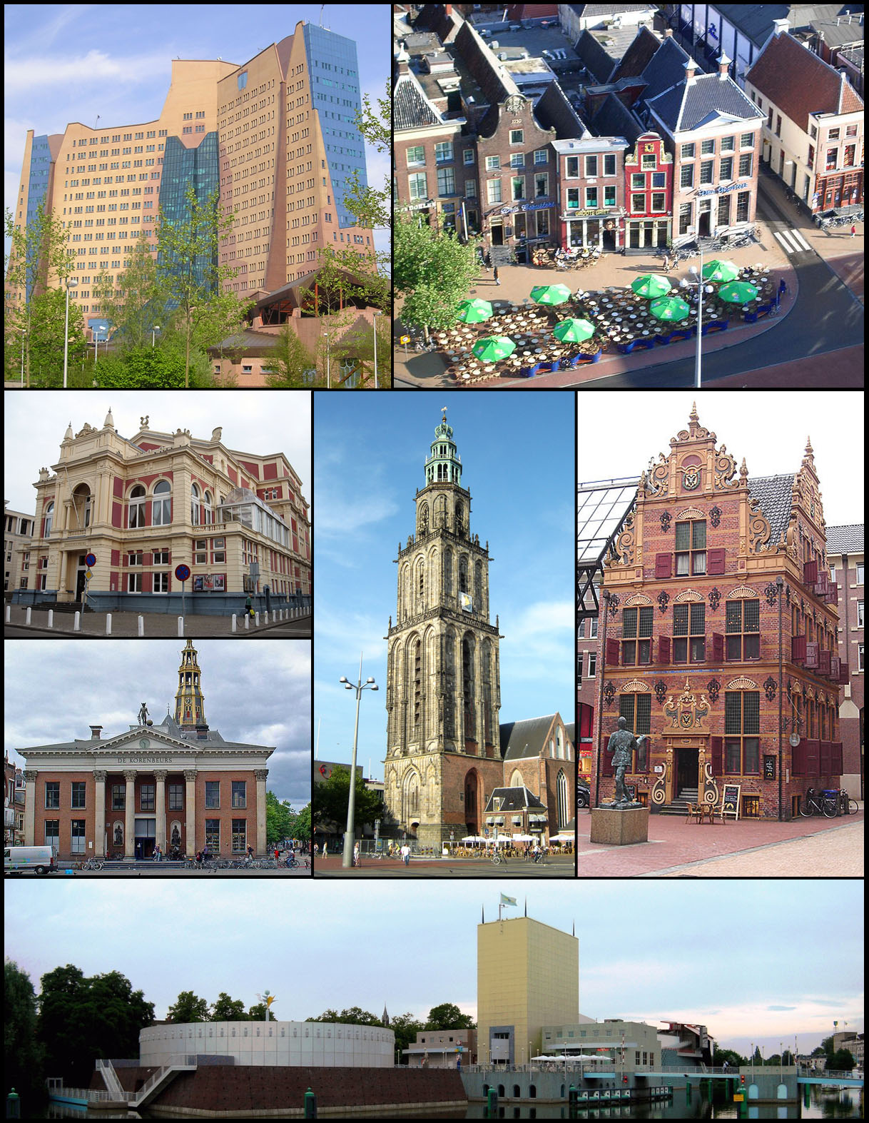 Van links naar rechts: Gasuniegebouw, Grote Markt Zuidzijde, De Stadsschouwburg, Korenbeurs, Martinitoren, Goudkantoor en Groninger Museum.